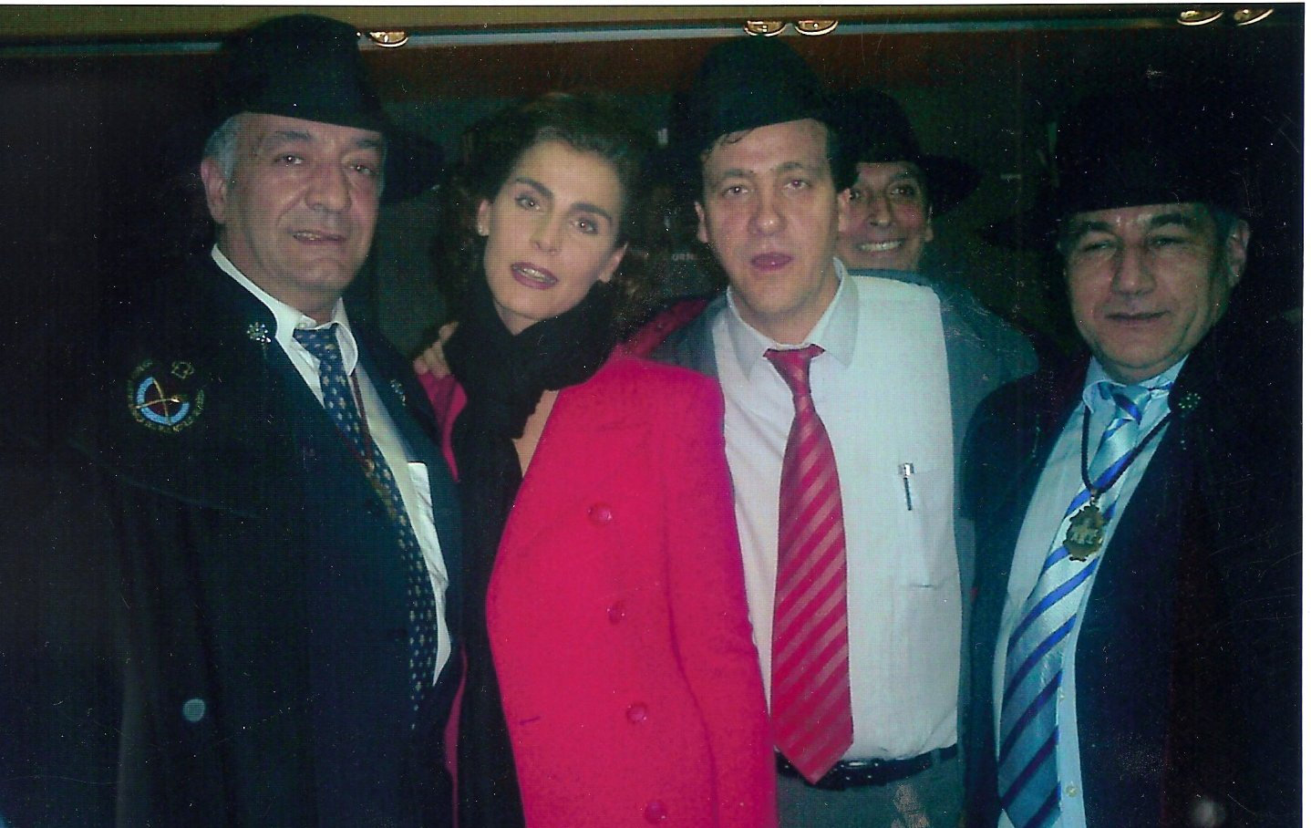 Cofrades de la Cofradía Gastronómica del Real Botillo del Bierzo con la Cofrade de Honor, Antonia Dell´Atte